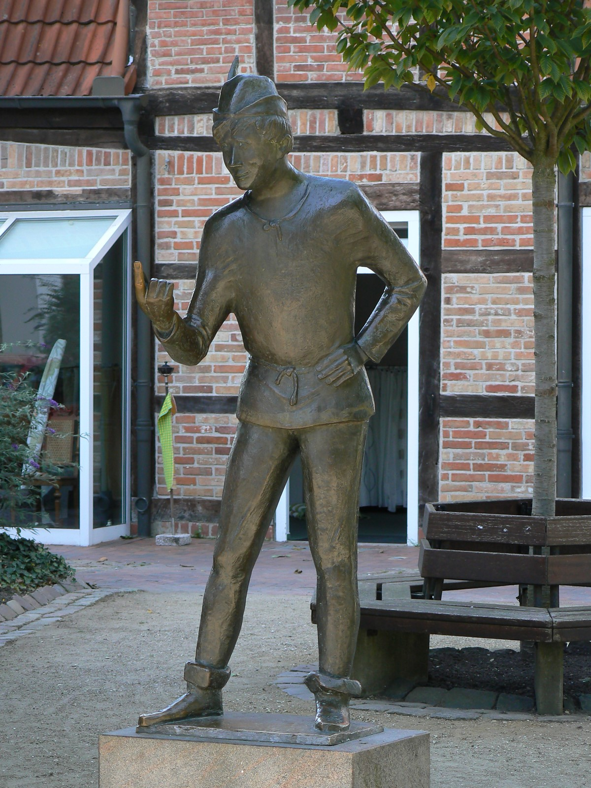 Plastik Dumm Hans de plietsche Buurnjung ut Wissers Geschichten. Standort: Eutin, Bildhauer: Karlheinz Goedtke (1989).